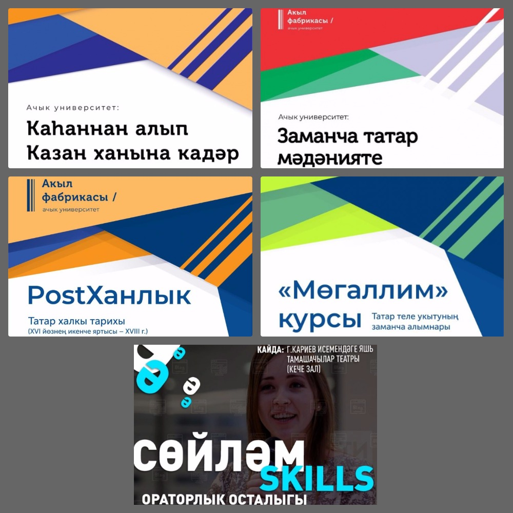 Ачык университет (Татарстан) оештырган курсларның афишалары